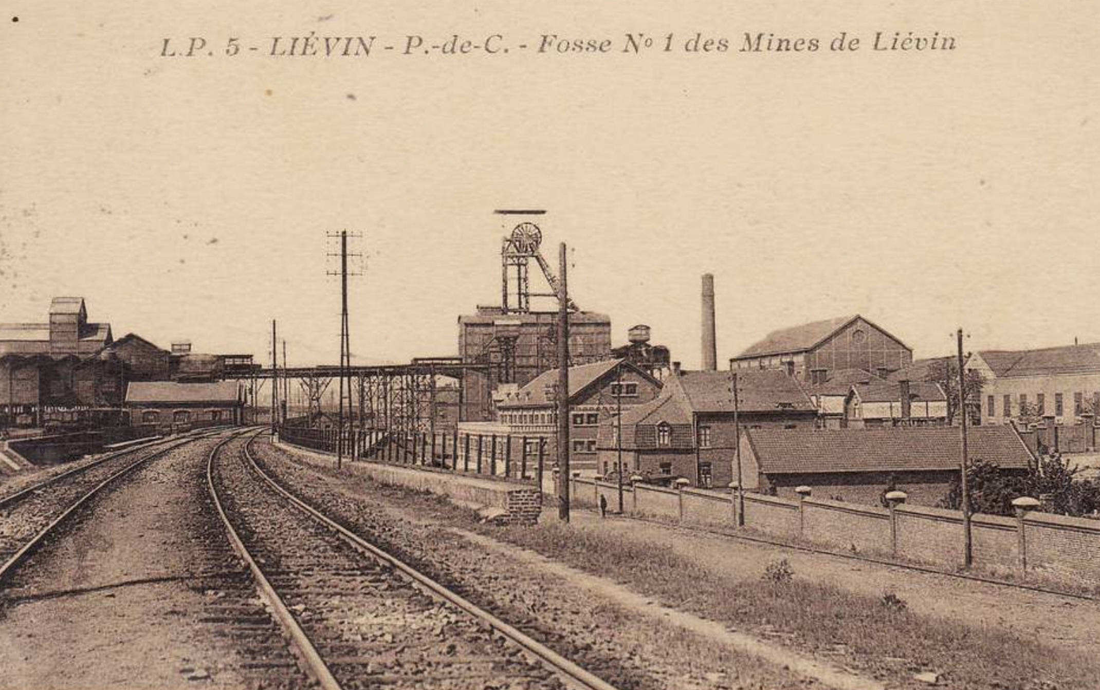 Fosse n° 1 - 1 bis - 1 ter de la Compagnie des mines de Liévin, Liévin, Pas-de-Calais, Nord-Pas-de-Calais, France.